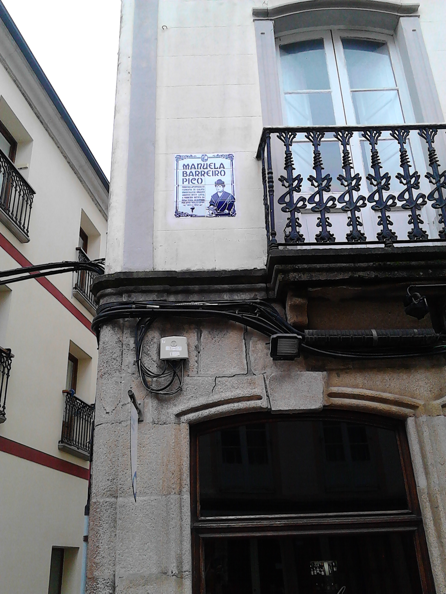 Placa na casa onde tivo farmacia Manuela Barreiro